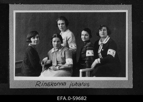 Naiskodukaitse Lääne Ringkonna juhatus, vasakult prl. L.Mauer (laekur), prl. H.Vaus (esinaise abi), pr. H.Raja (ringkonna esinaine), prl. N.Supronenko (sekretär), pr. H.Lassur. Haapsalu